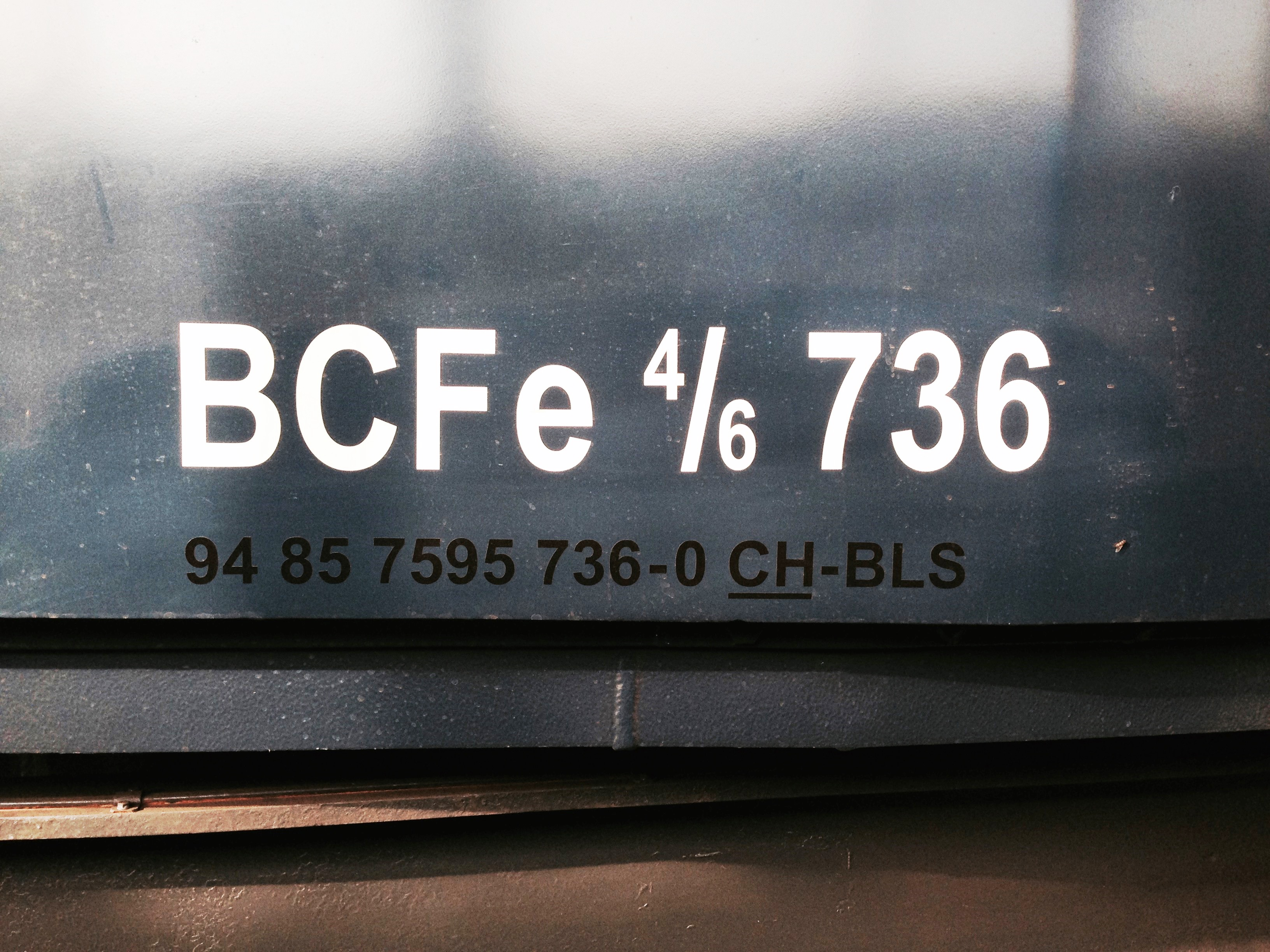 Anschrift mit TSI-Nummer am Triebwagen BCFe 4/6 Nr. 736 der BLS